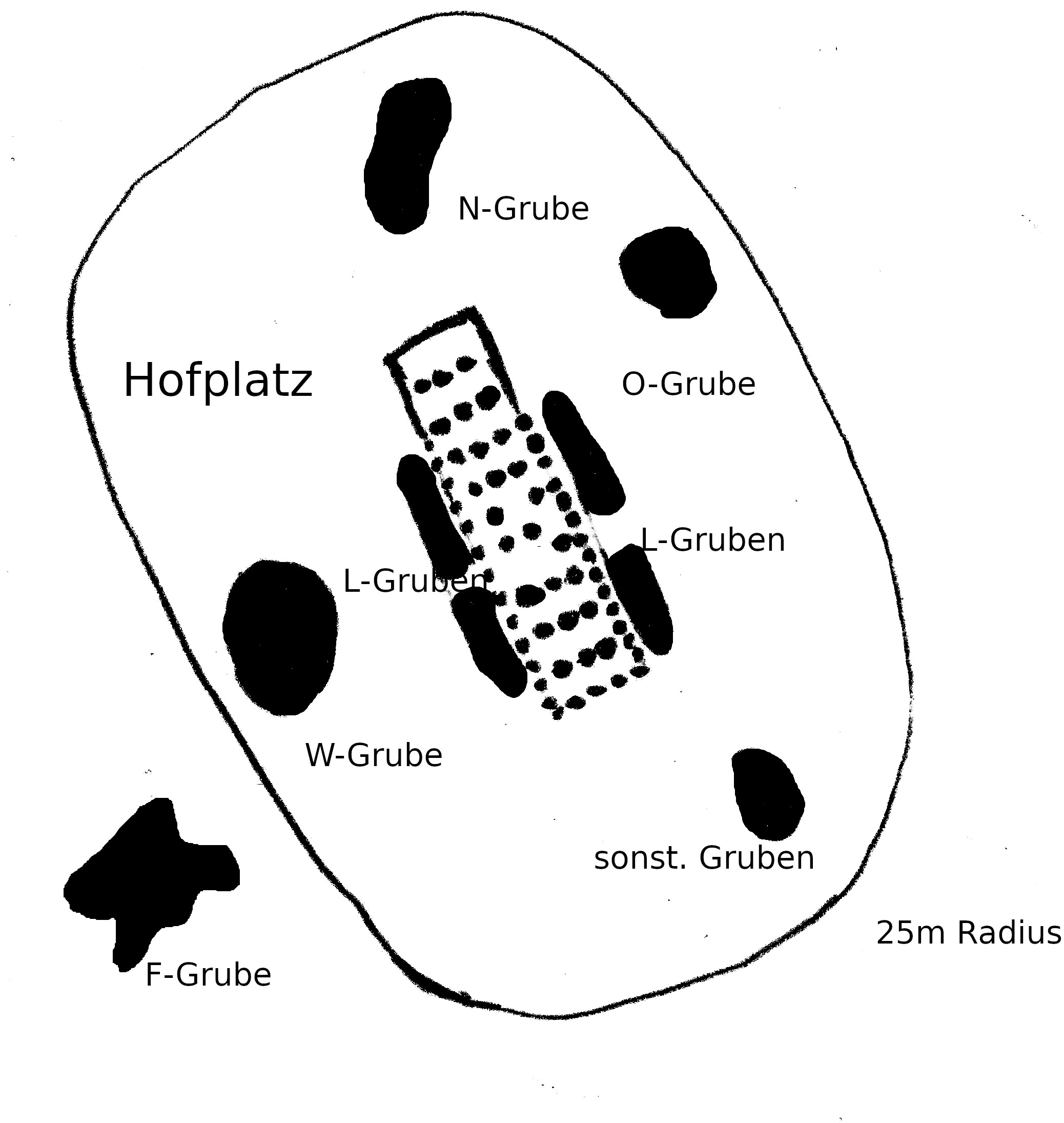 Nachzeichnung Modell eines bandkeramischen Hofplatzes von 25m Radius mit seinen typischen Gruben (N=Nord, O=Ost, W=West, sonstige Gruben, L=Längsgruben, hausbegleitend auf beiden Seiten, F=Freie Grube). Literatur: Ulrich Boelicke, Gruben und Häuser: Untersuchungen zur Struktur bandkeramischer Hofplätze. In: Juraj Pavúk (Hg.), Siedlungen der Kultur der Linearkeramik in Europa (Nitra 1982).